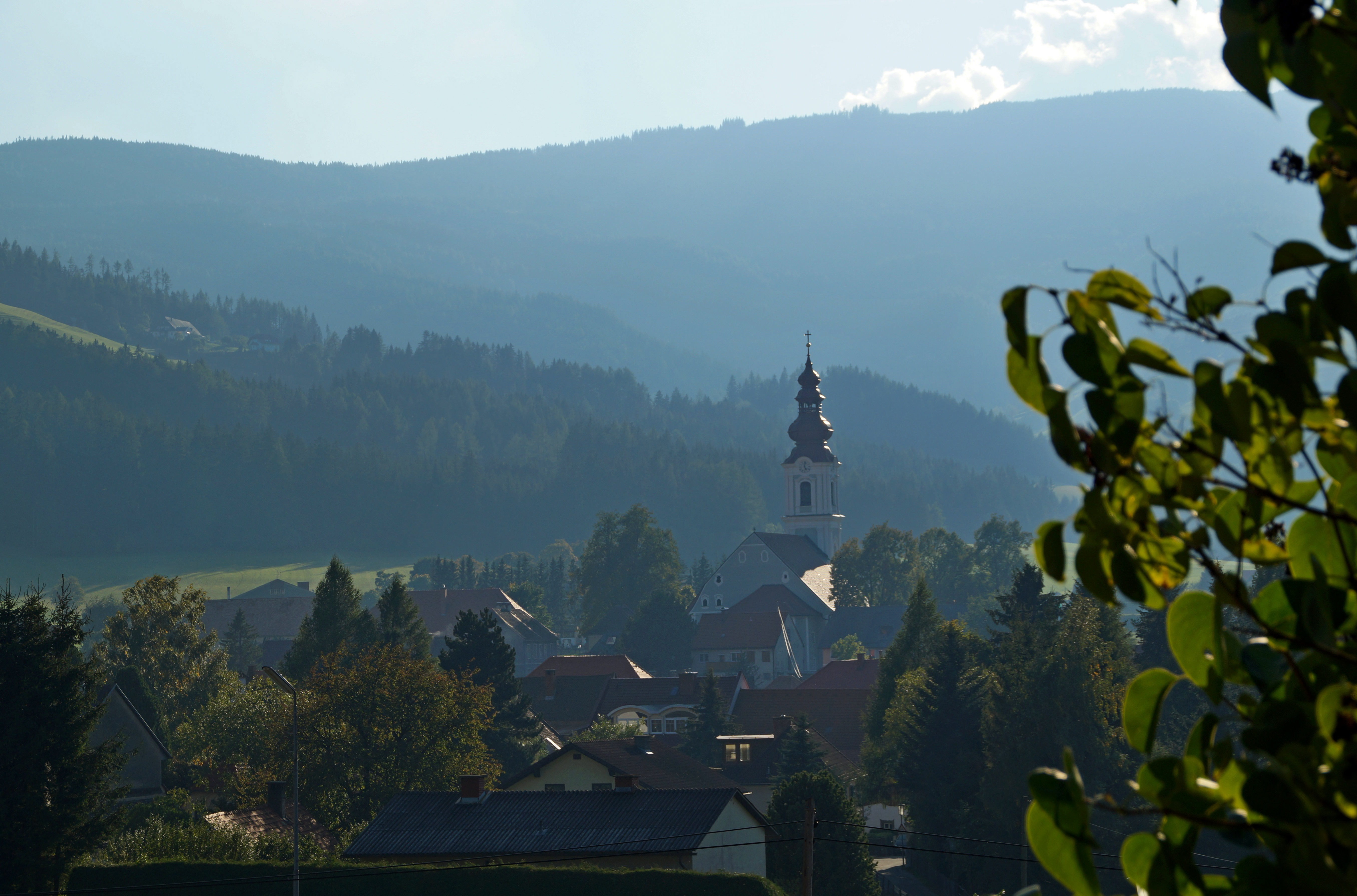 Kath. Pfarrkirche St. Ägyd, Obdach, Bezirk Murtal